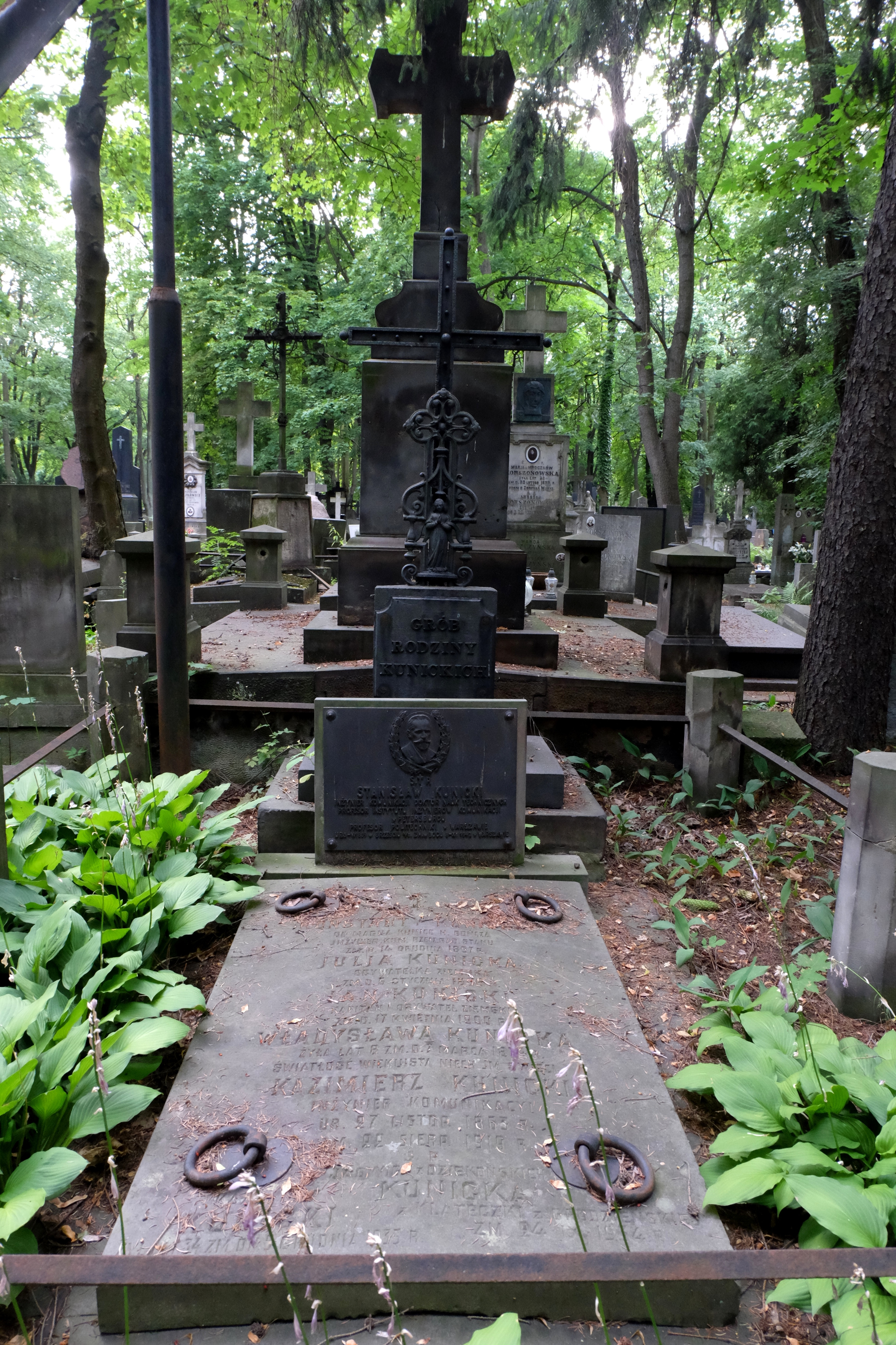 Grób inżyniera komunikacji i rzeczywistego radcy stanu Konstantego Kunickiego oraz inżyniera komunikacji profesora Stanisława Kunickiego na Cmentarzu Powązkowskim w Warszawie